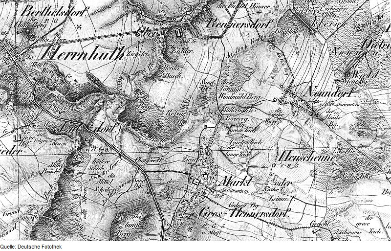 Original image description from the Deutsche FotothekGroßhennersdorf. Oberreit, Sect. Zittau, 1844/46